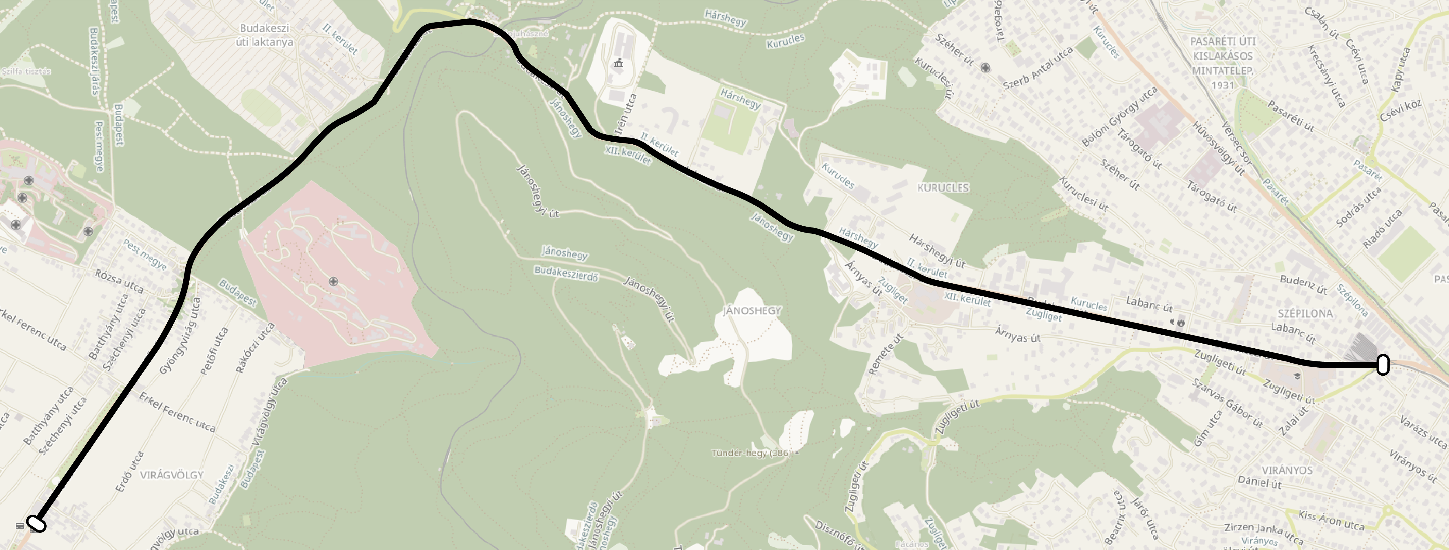 Az 1946-ban megtervezett trolibuszhálózat budakeszi része. This map may be incomplete, and may contain errors. Don't rely solely on it for navigation.